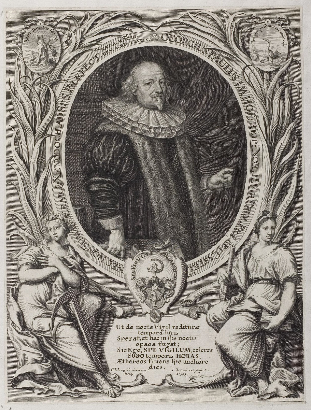 Grafik aus dem Klebeband Nr. 3 der Fürstlich Waldeckschen Hofbibliothek Arolsen Motiv: Georg Paulus Imhof (1603–1689), 1634 Ratsmitglied, 1637 junger Bürgermeister, 1666 u.a. Pfleger der Stiftungen zu St. Peter und St. Jobst, 1671 Bauherr, 1675 Vorderster Losunger, 1676 Reichsschultheiß der Reichsstadt Nürnberg; er erlebte als letzter Leiter des Imhoffschen Handelshauses dessen Ende